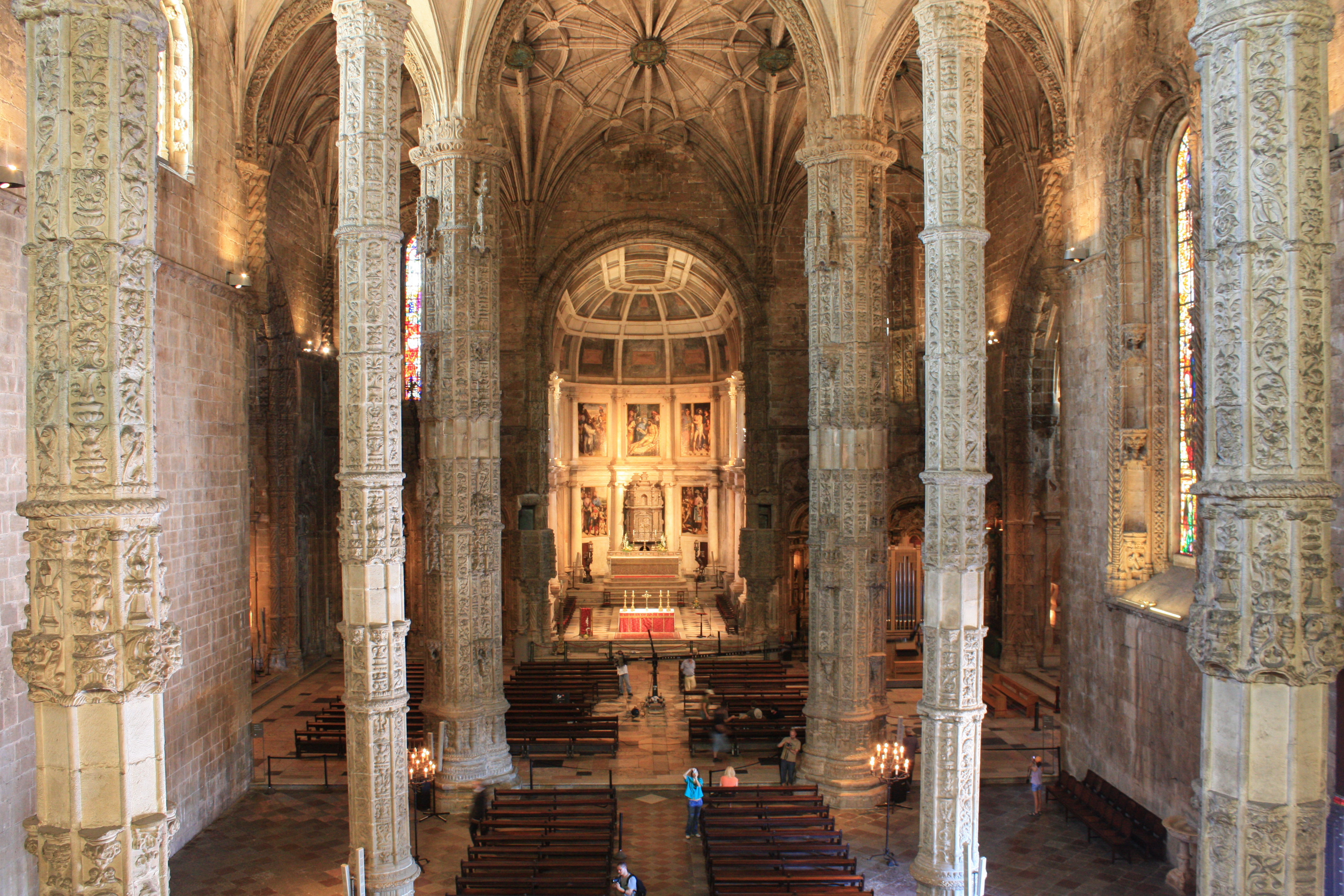 Die Kirche des Hieronymus-Kloster von innen.